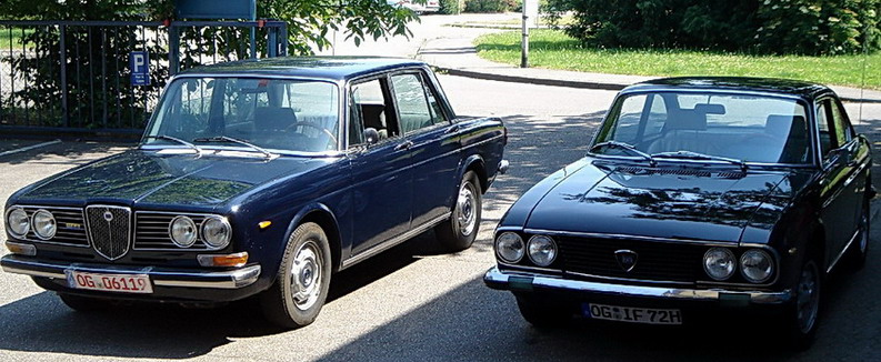 Lancia 2000 i.e. Berlina und 2000 HF Coupe